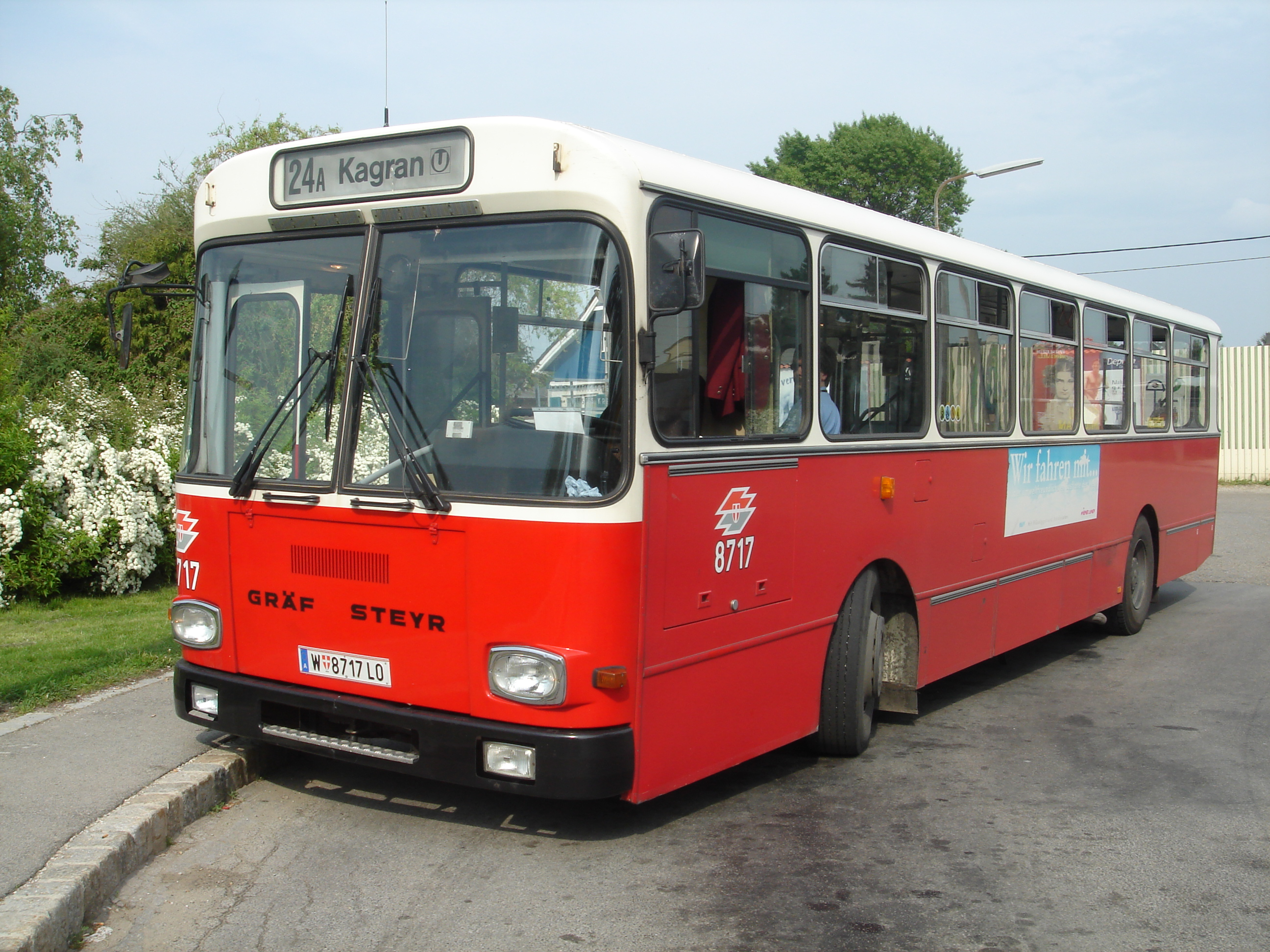 LU 200 M11 (8717) am 13.05.2006 auf der Linie 24A in Neuessling (22. Wiener Gemeindebezirk).